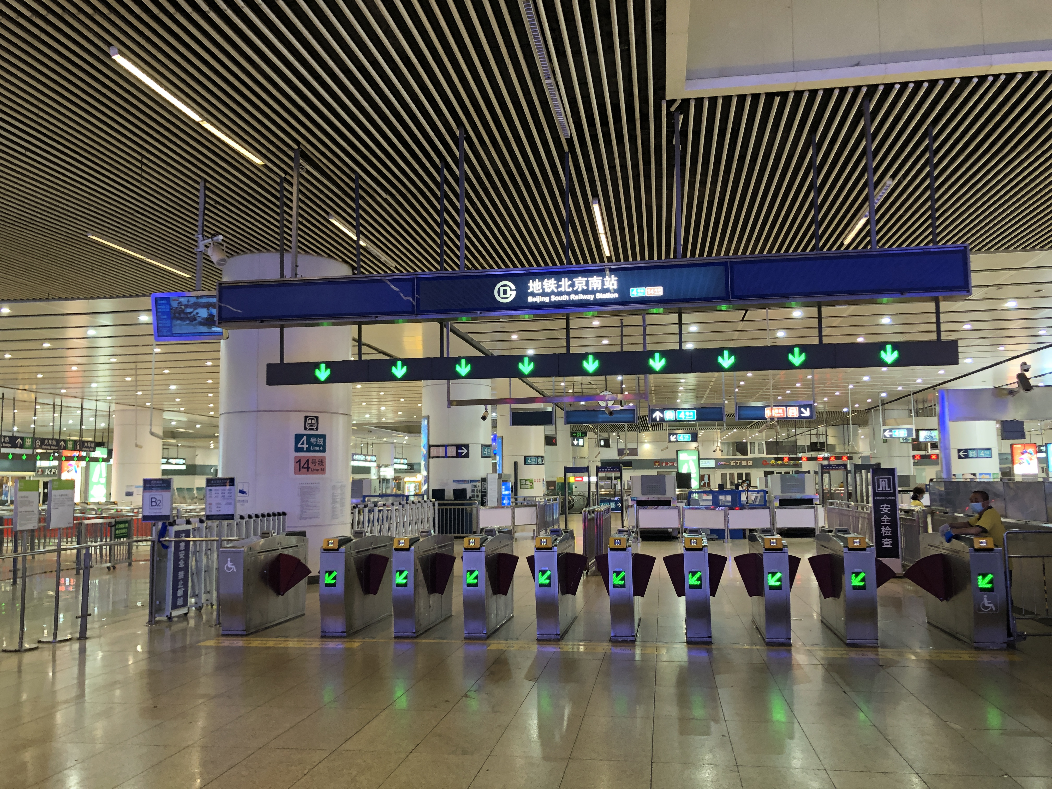 中文（中国大陆）: 北京地铁北京南站B2口